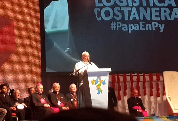 Papa Francisco durante su encuentro con los jóvenes en la Costanera de Asunción, Paraguay. Domingo 12 de julio de 2015.